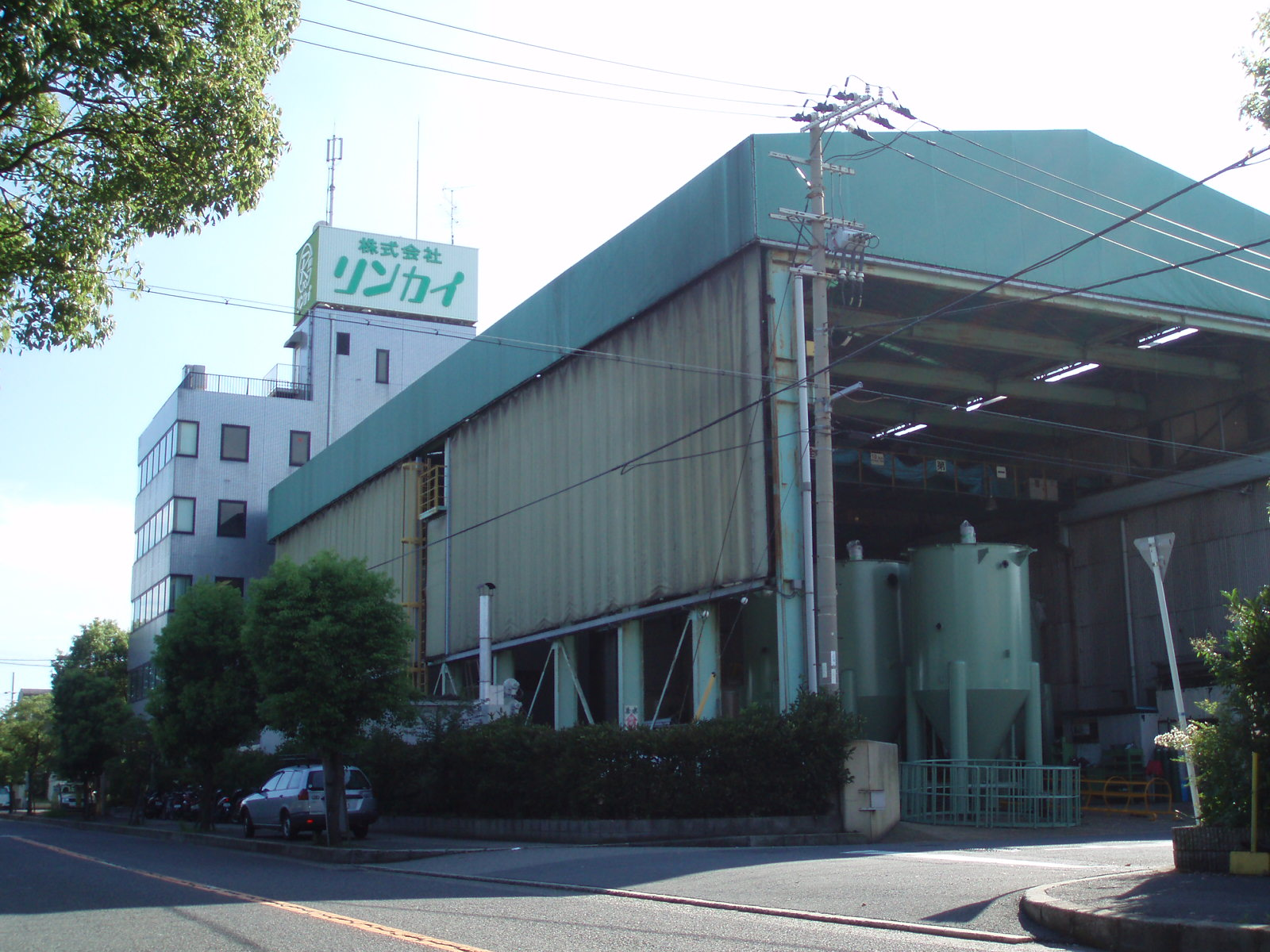 株式会社リンカイ本社